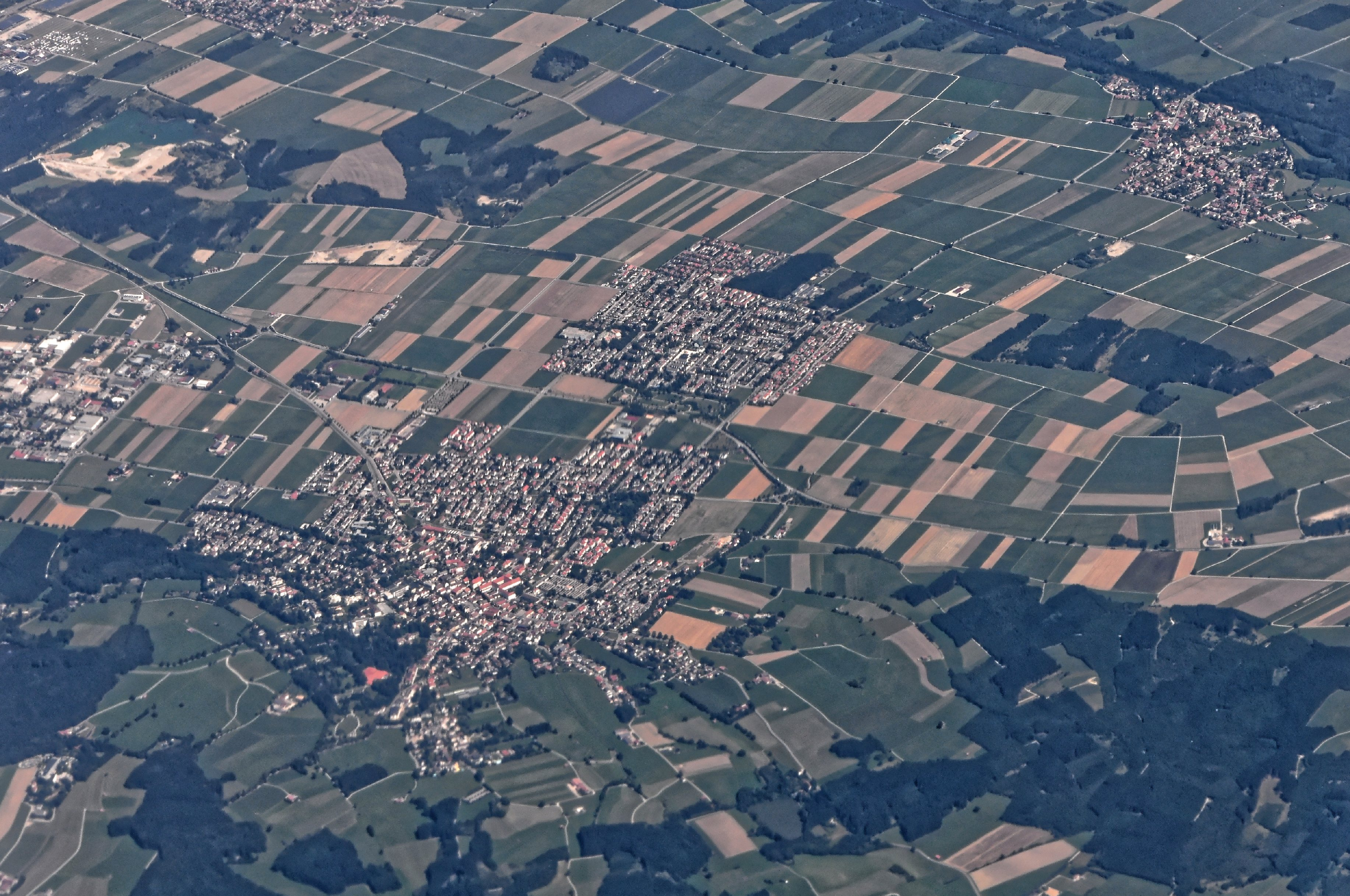 Bilder vom Flug -Rom-Düsseldorf-Hamburg 2013 Dieses Foto entstand in Zusammenarbeit mit Stadtbesichtigungen.de Die Seiten Stadtbesichtigungen.de, der dazugehörige Reise Blog sowie die Facebookseite: Stadtbesichtigungen Rom dürfen dieses Bild für Ihre Veröffentlichungen ohne den Hinweis auf Wikipedia, Commons bzw der Lizenz verwenden. Die Verantwortlichen habe von mir (Ra Boe) die Originaldaten zur freien Verfügung übermittelt bekommen.